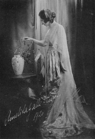 Amelita Galli-Curci Project Gutenberg eText 15446 From [1]